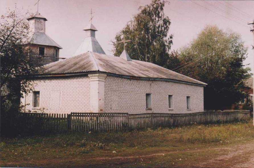 Тут розміщувалая церковно-приходська школа.